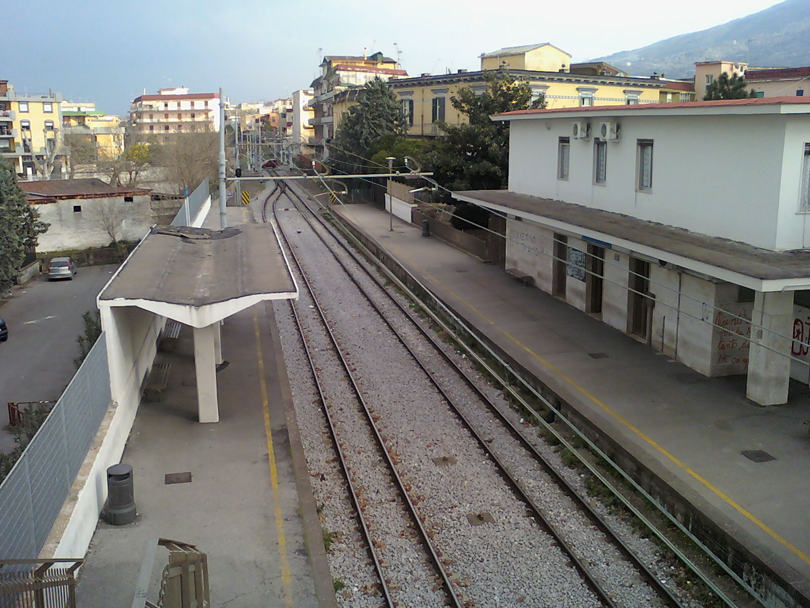 immagine di mia proprietà (Lusb)